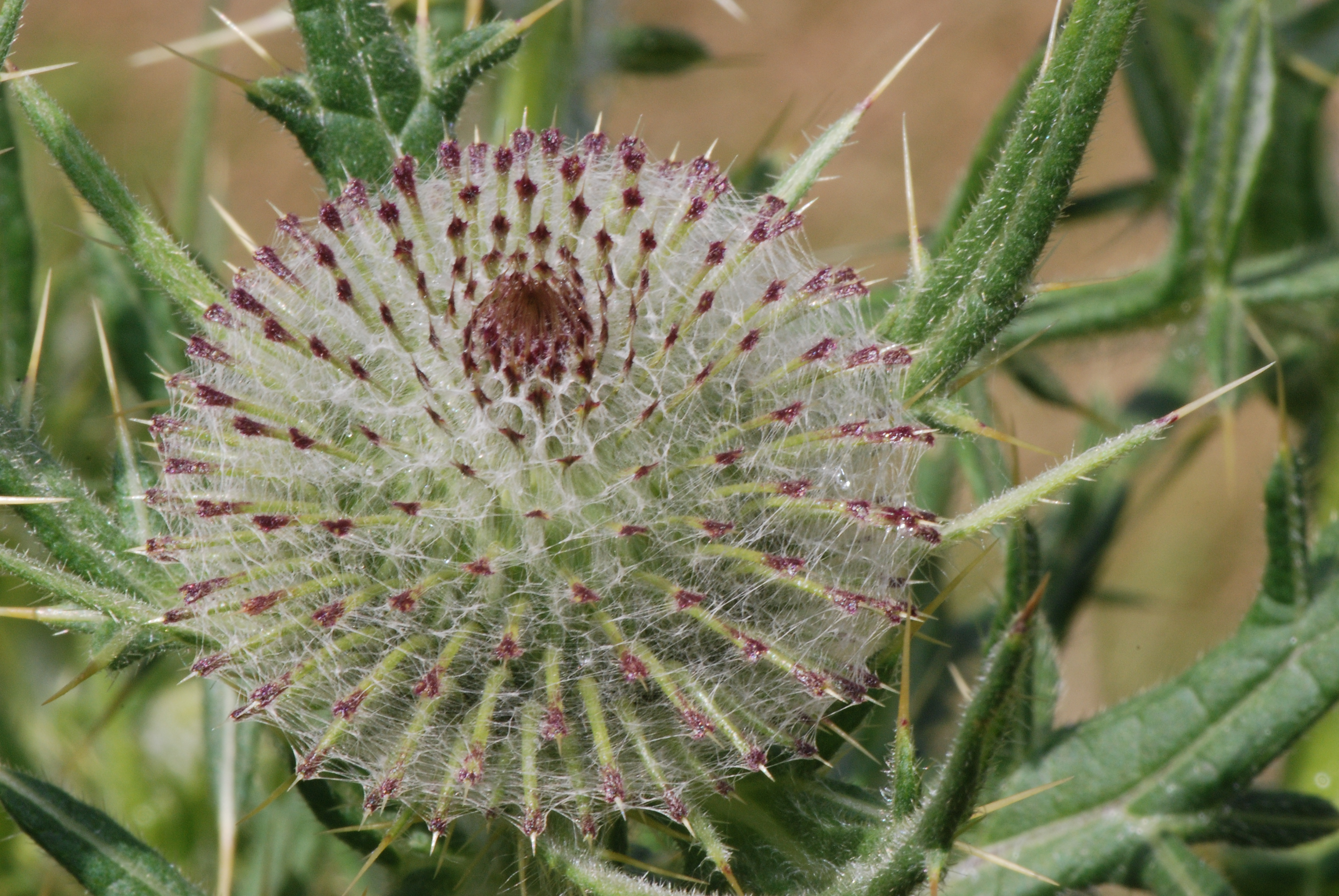 Cirsium eriophorum Bray-sur-Somme (Somme), France